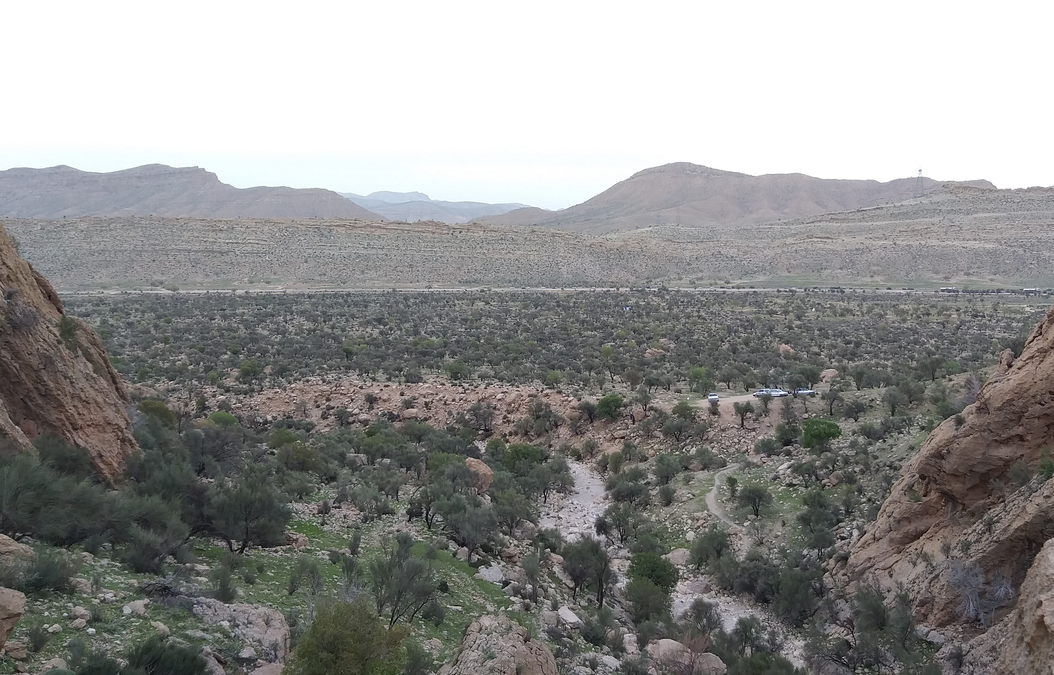 منطقه چاتیز جهرم